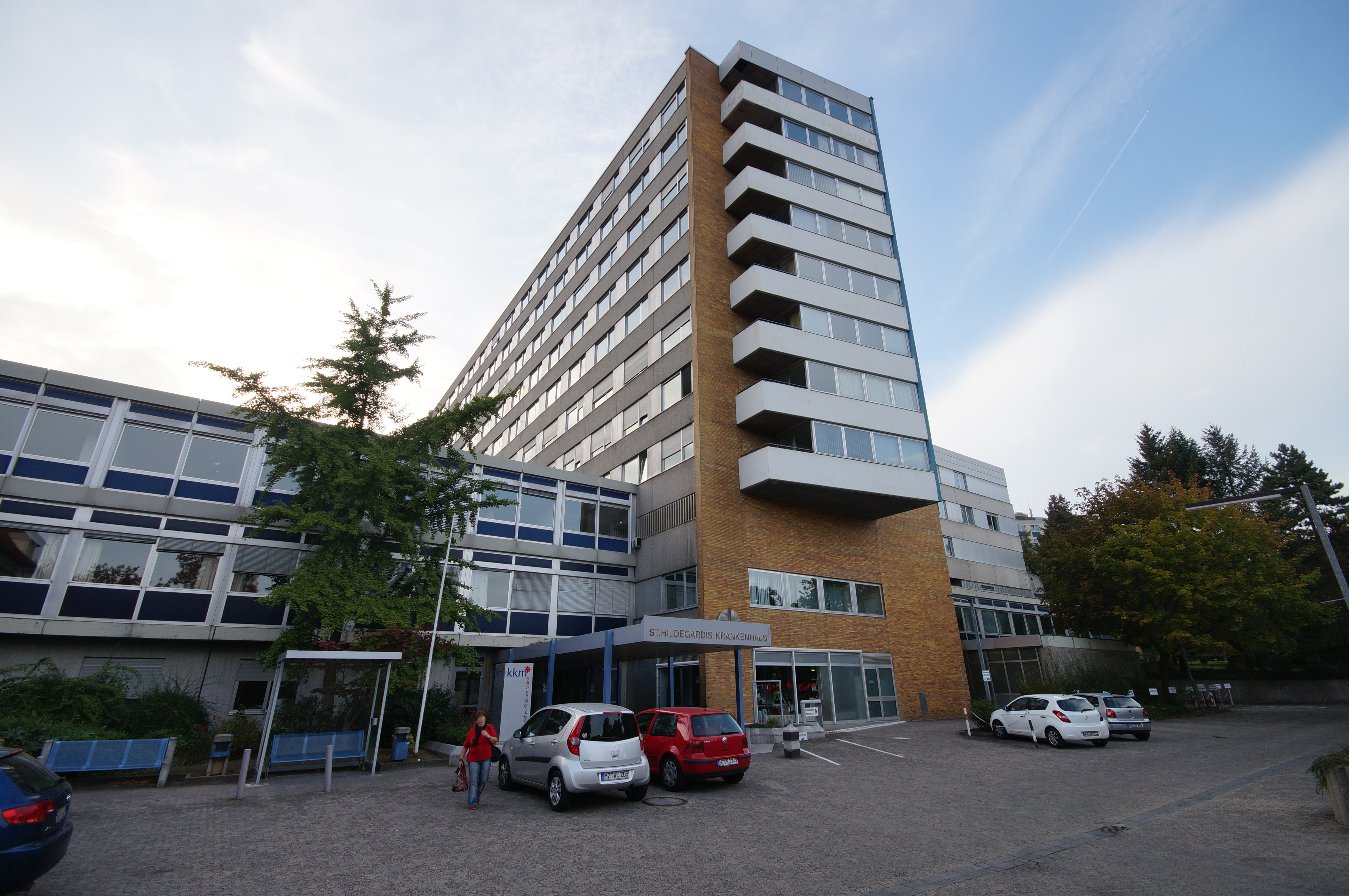 Der Haupteingang des Katholischen Klinikums Mainz (St. Hildegardis-Krankenhaus) in Mainz-Oberstadt.